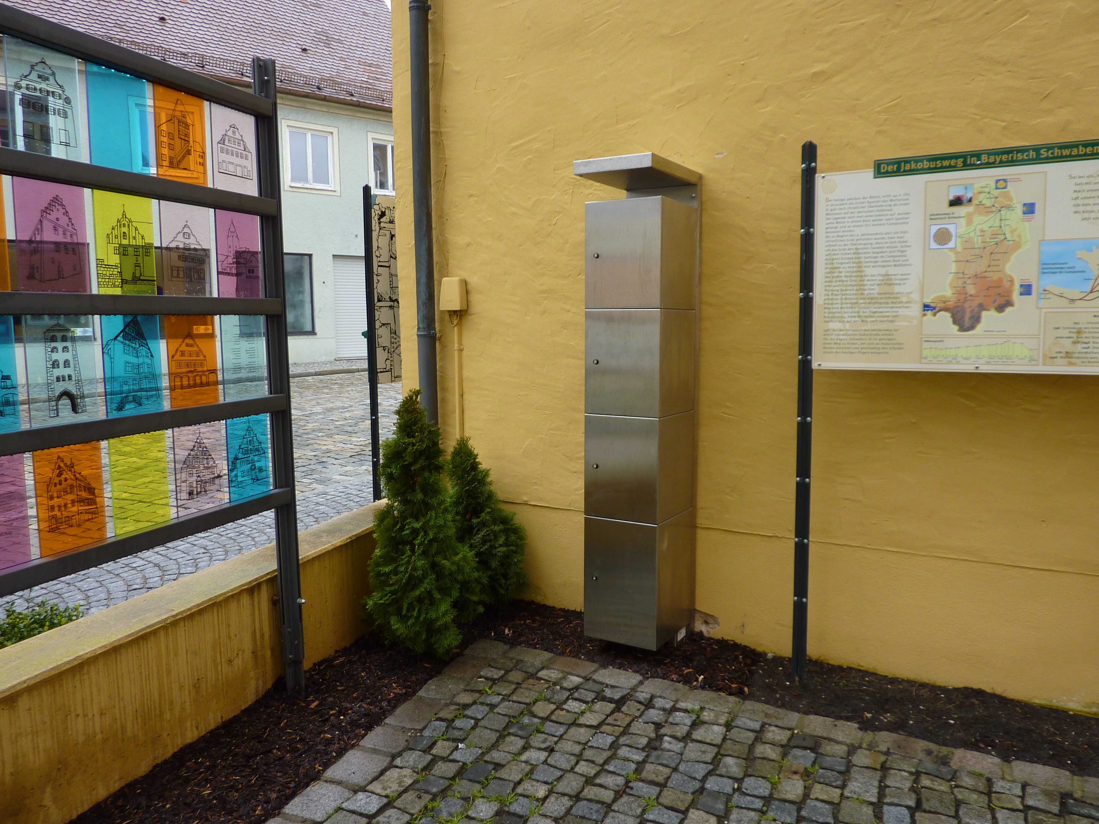 E-Bike-Ladestation